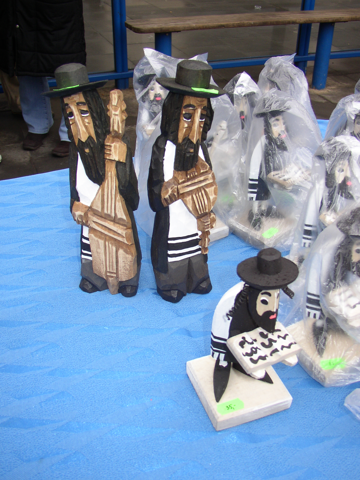 Kraków - Emaus 2008 - stand - traditional Jew dolls